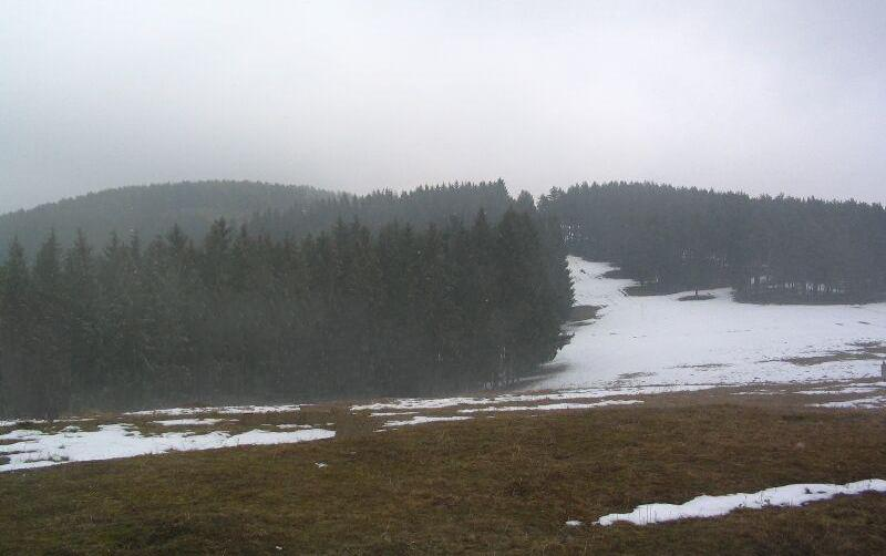 A Répát-hegység déli része, Erdély